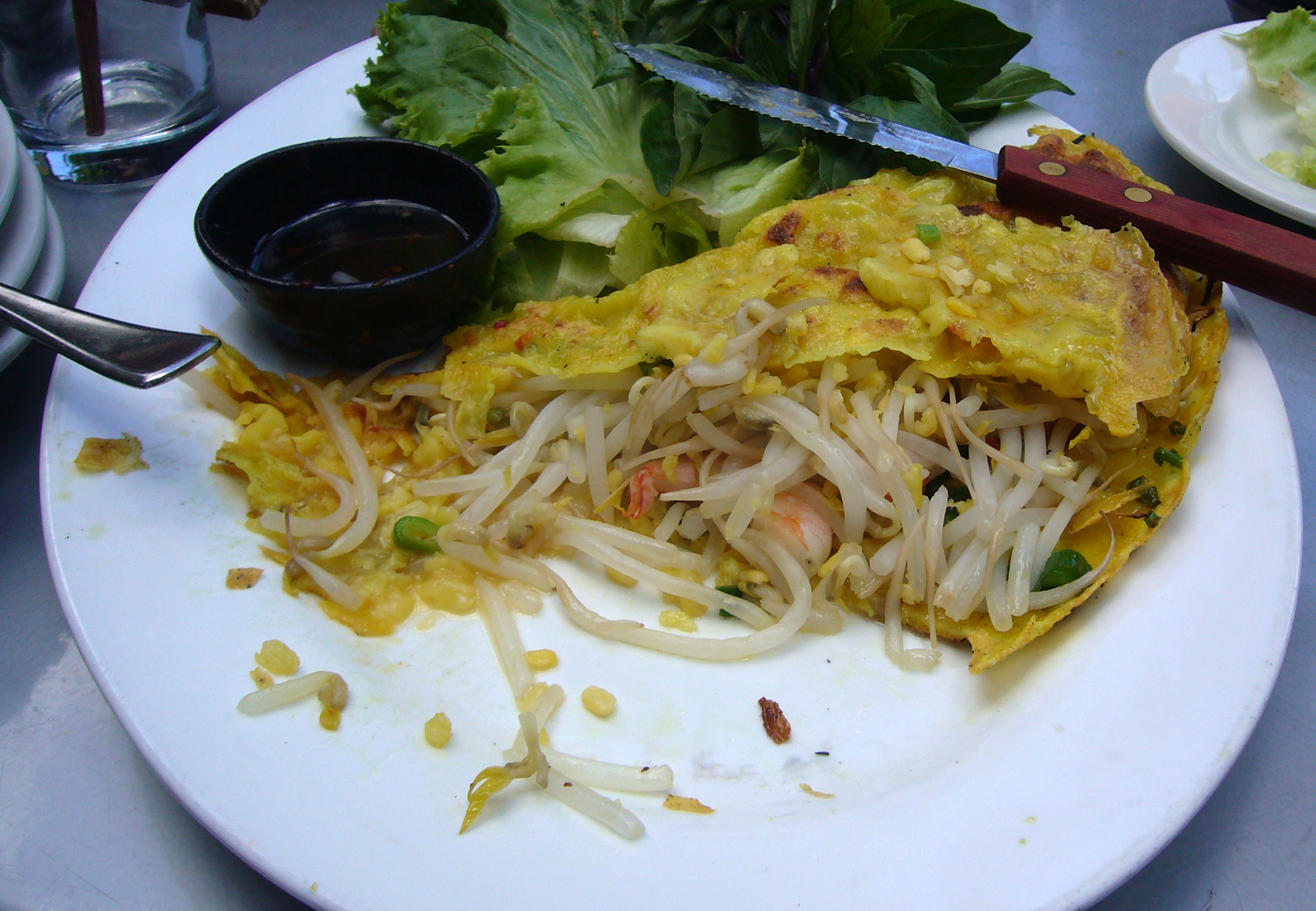 A bánh xèo.